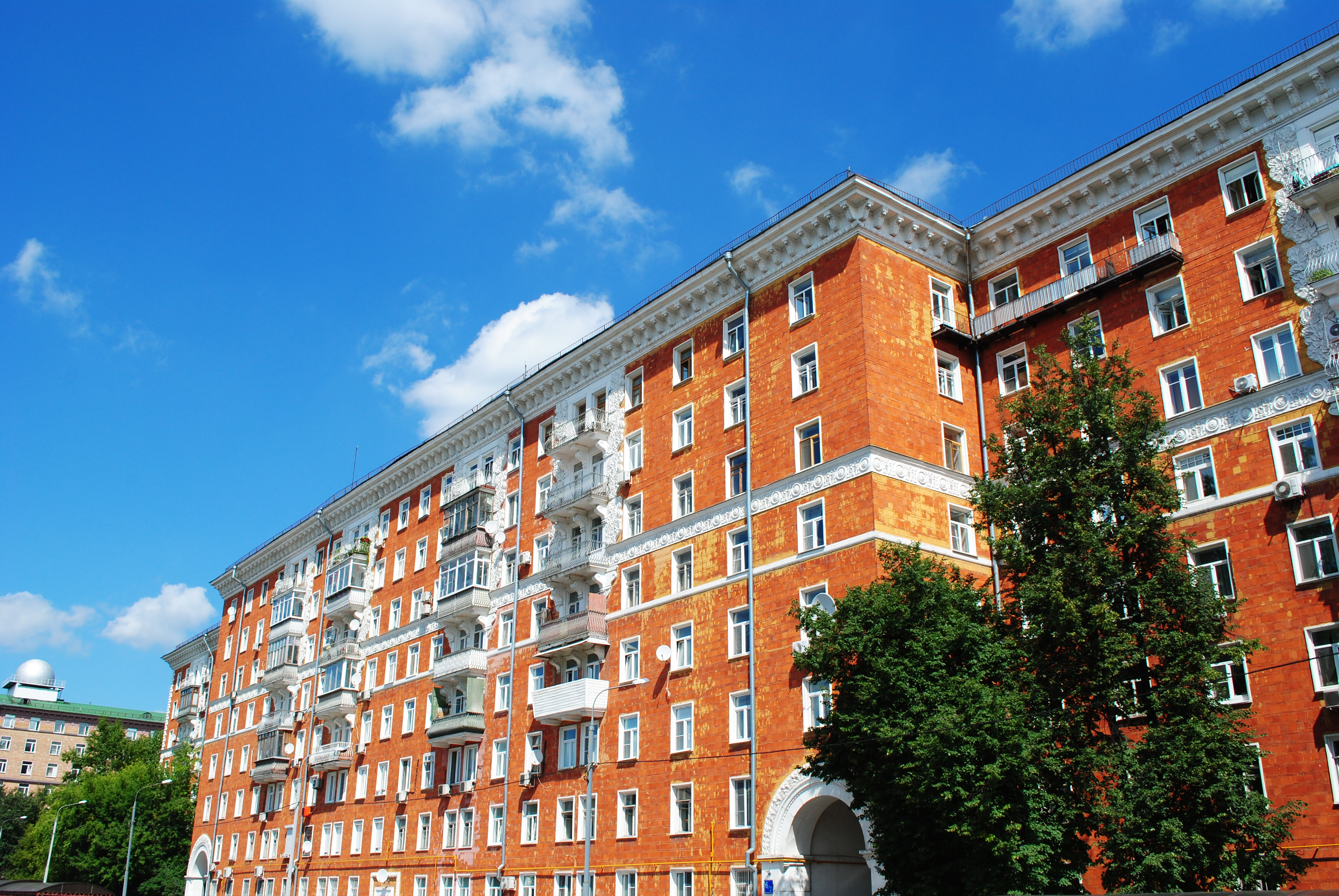 «Красные дома» (д. 6)